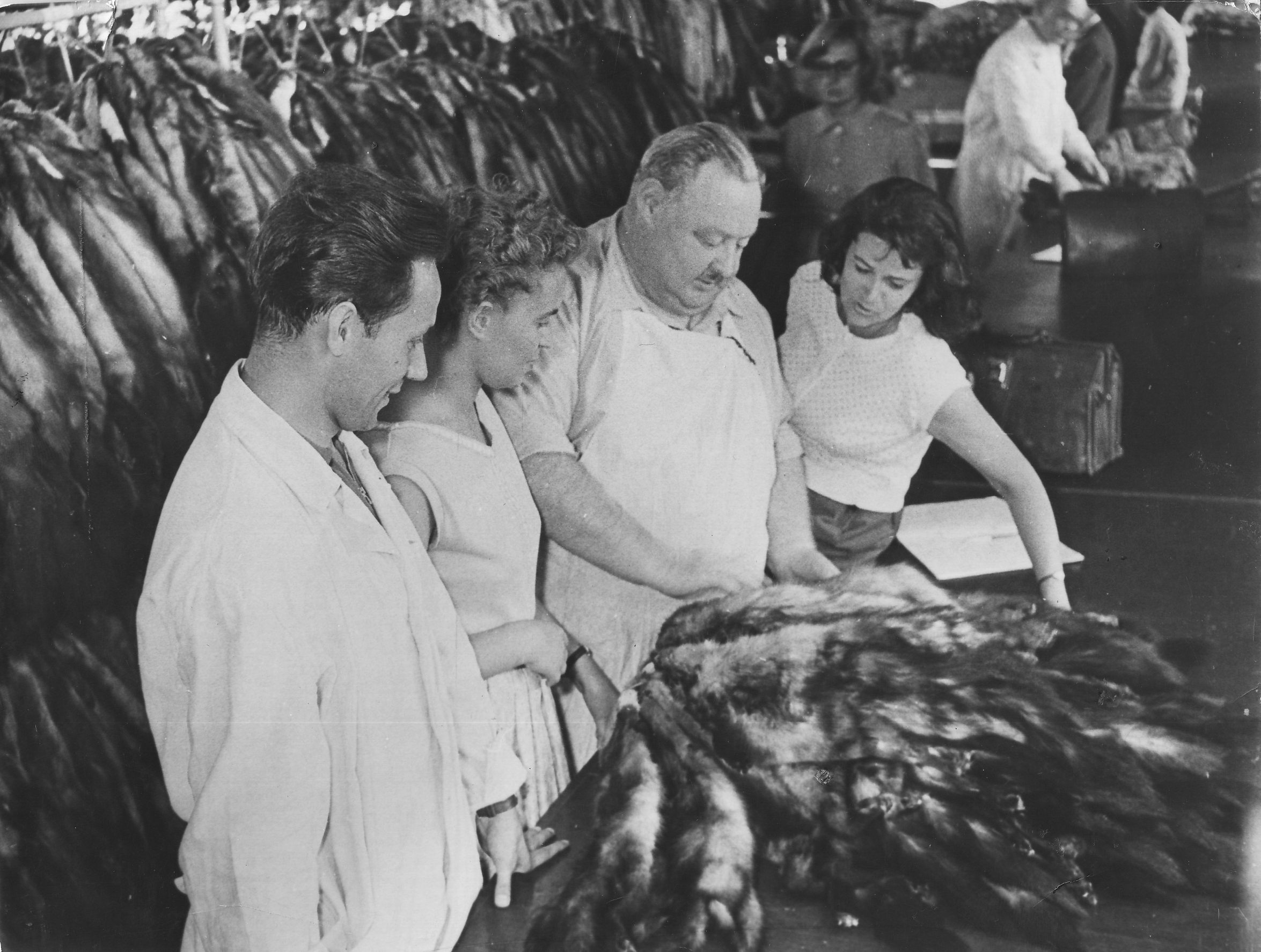 Jury Fränkel, Besichtigung der Felle vor der Auktion bei der Sojuzpushnina, Leningrad.